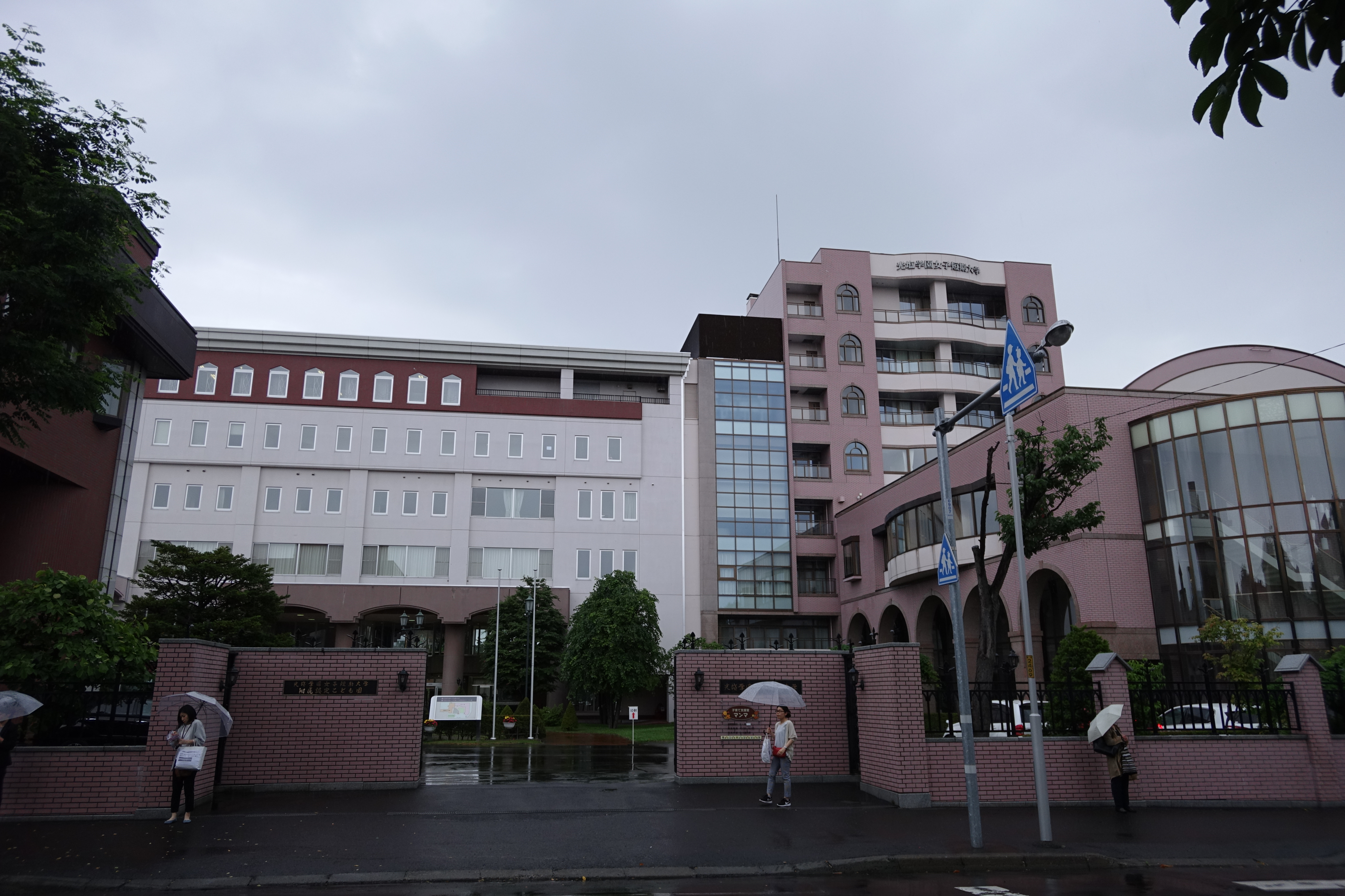 光鹽學園女子短期大學。